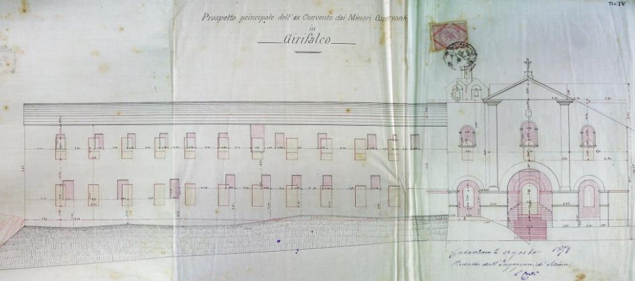 Progetto di riduzione dell’ex convento dei frati minori di Girifalco a Manicomio Provinciale - Tav. IV - Prospetto principale dell’ex convento dei minori osservanti di Girifalco